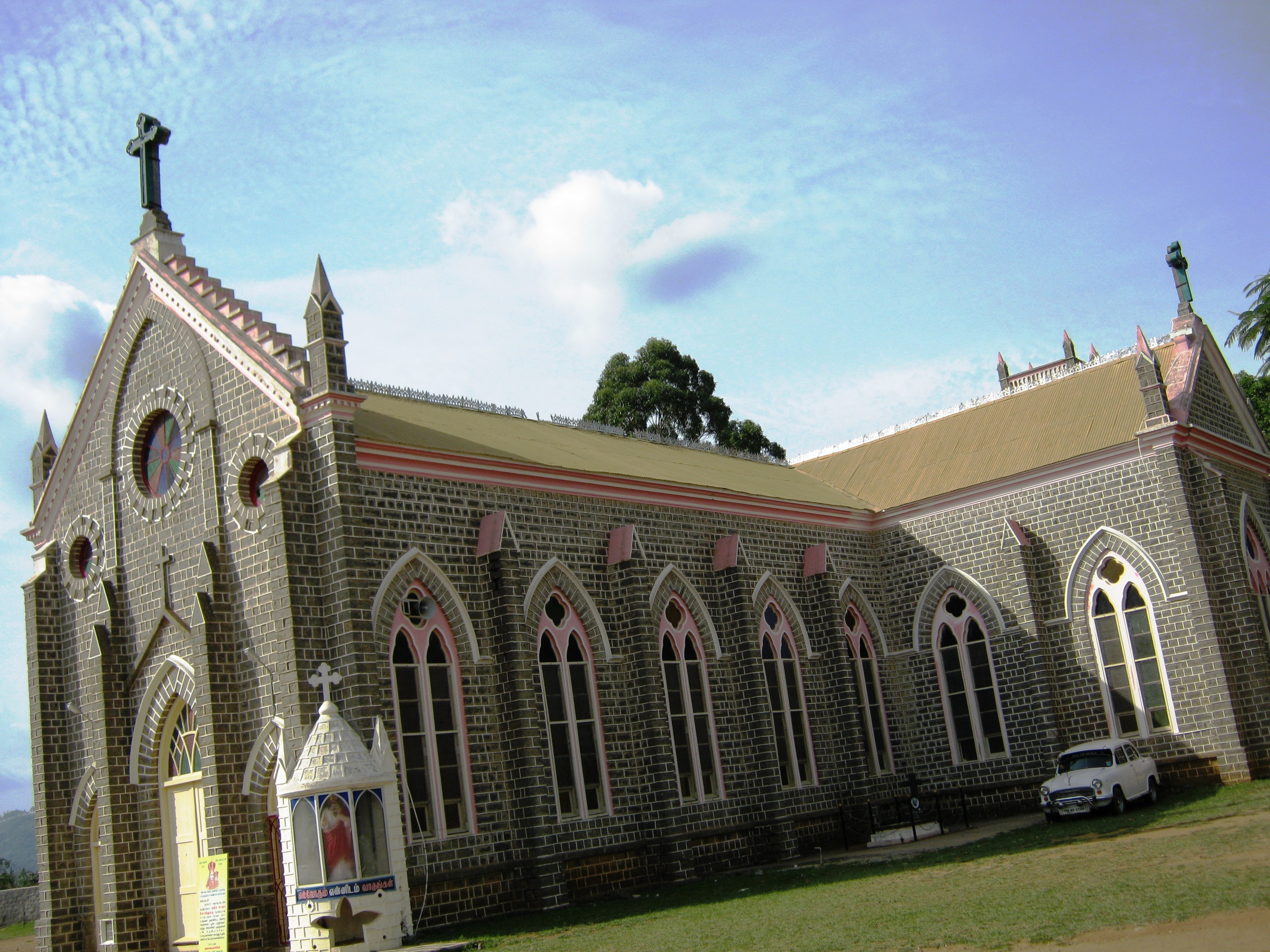 SACRED HEART CHURCH, Yercaud, Salem